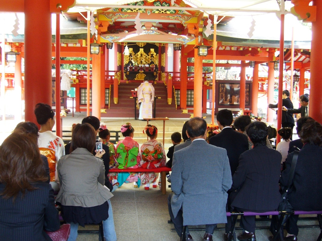 神戸市中央区の生田神社での七五三まいりの様子。祝詞をあげる神職の後には、着物で着飾った女の子がどうしても目立ち、男の子の影は薄い。その後にはその家族たちが参列しているが、右のほうには子供の晴れ姿をビデオやデジタルカメラで撮影する親や祖父の姿がある。2006年11月3日に投稿者が撮影。